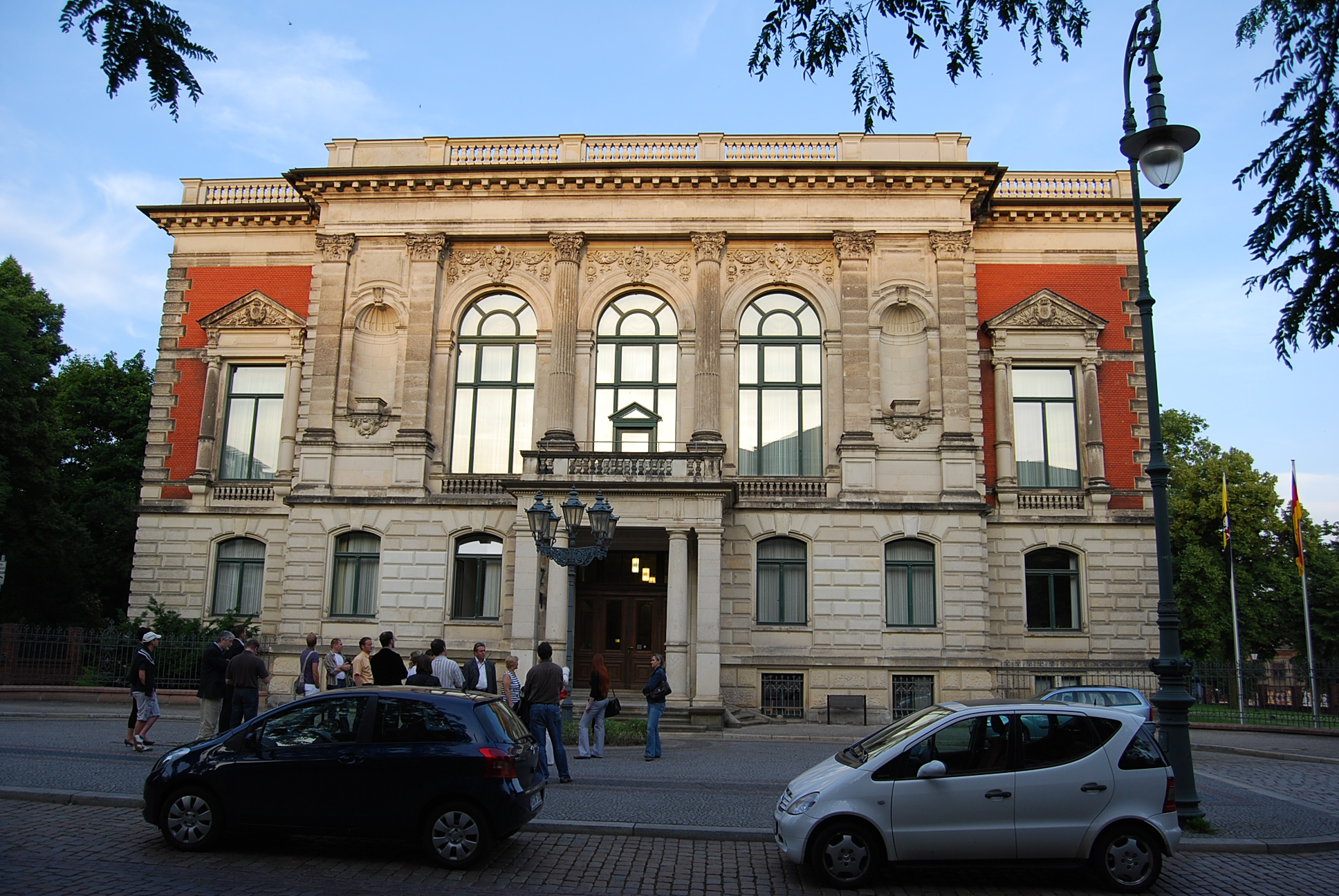 Staatskanzlei in Magdeburg, Sitz des Ministerpräsidenten